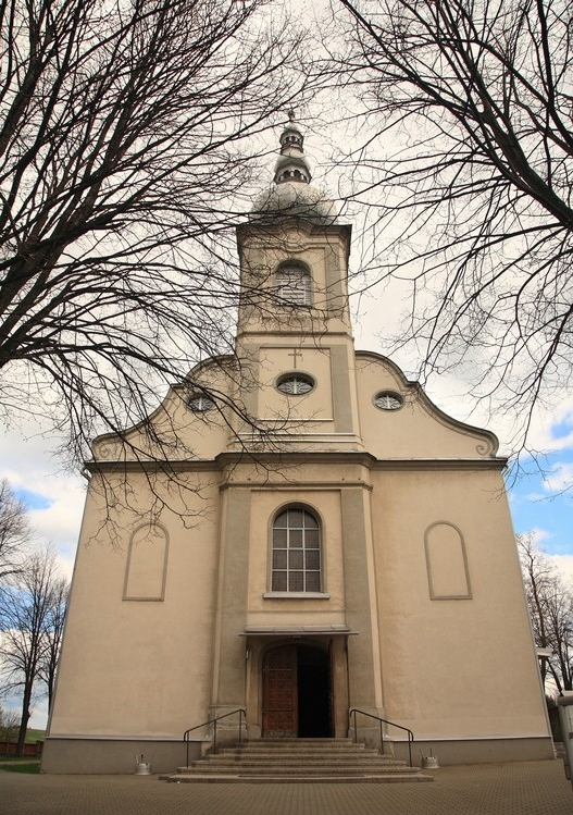 Kościół parafialny Przemienienia Pańskiego w Jabłonce, z lat 1802–1817 (województwo małopolskie)